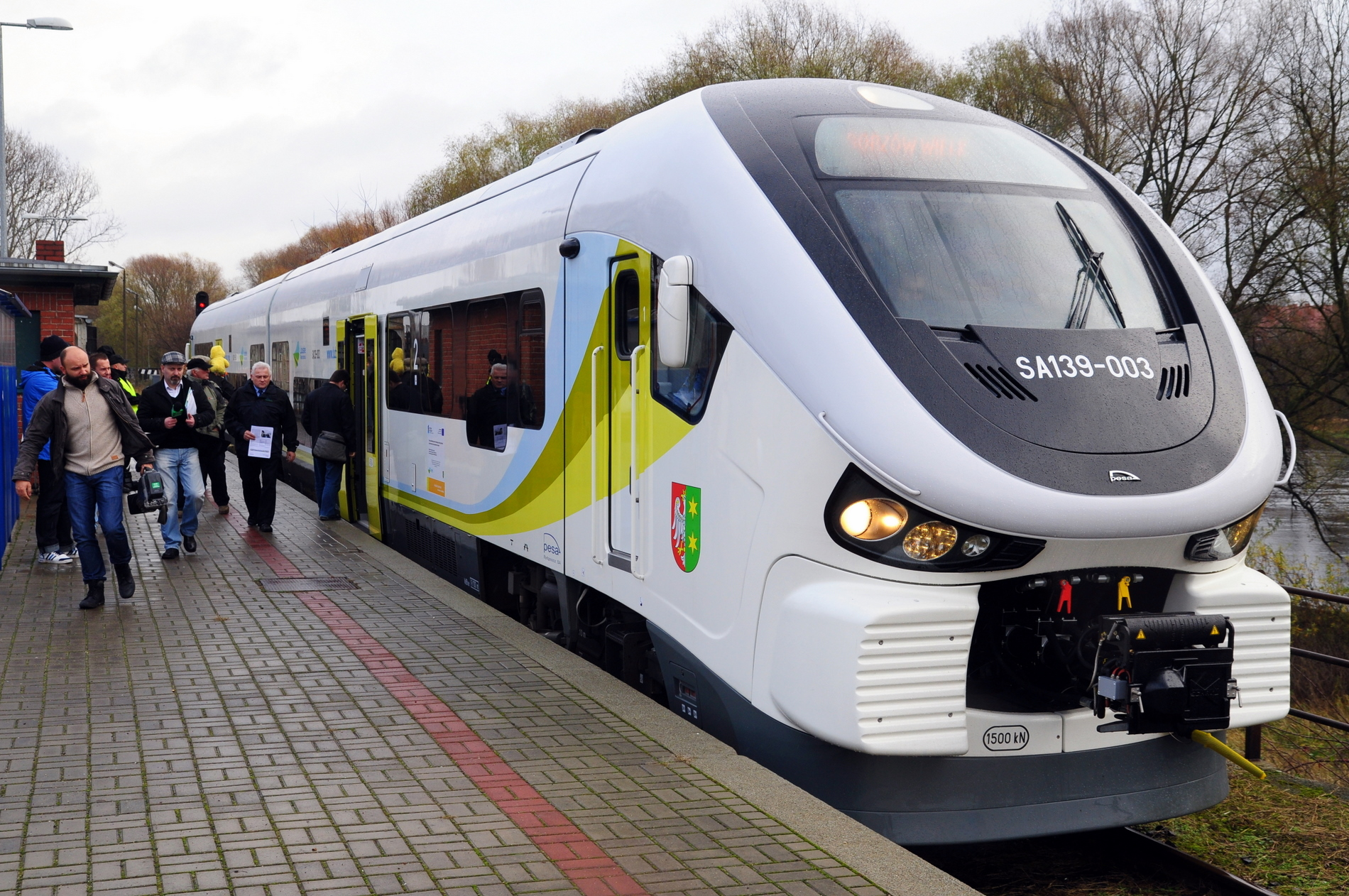 24. 11. 2013 r.- wjazd na peron 4 pociągu z Zielonej Góry, przywracający zlikwidowane w 2007 r. połączenie z Gorzowem Wlkp. Pociąg: Pesa Link ( SA 139-003 ), pierwszy z czterech zamówionych przez Urząd Marszałkowski.